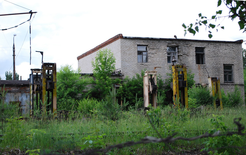 Первый гейт на ВРТТЗ